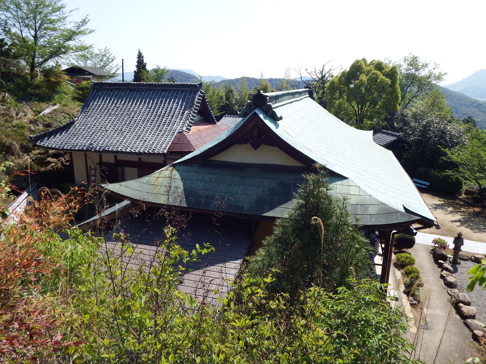 霊芝寺の奥之院大師堂